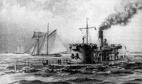 Броненосные башенные лодки типа “Ураган”